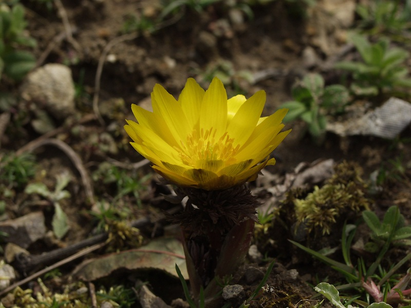 Adonis Amurensis フクジュソウ 側金盞花 福壽草